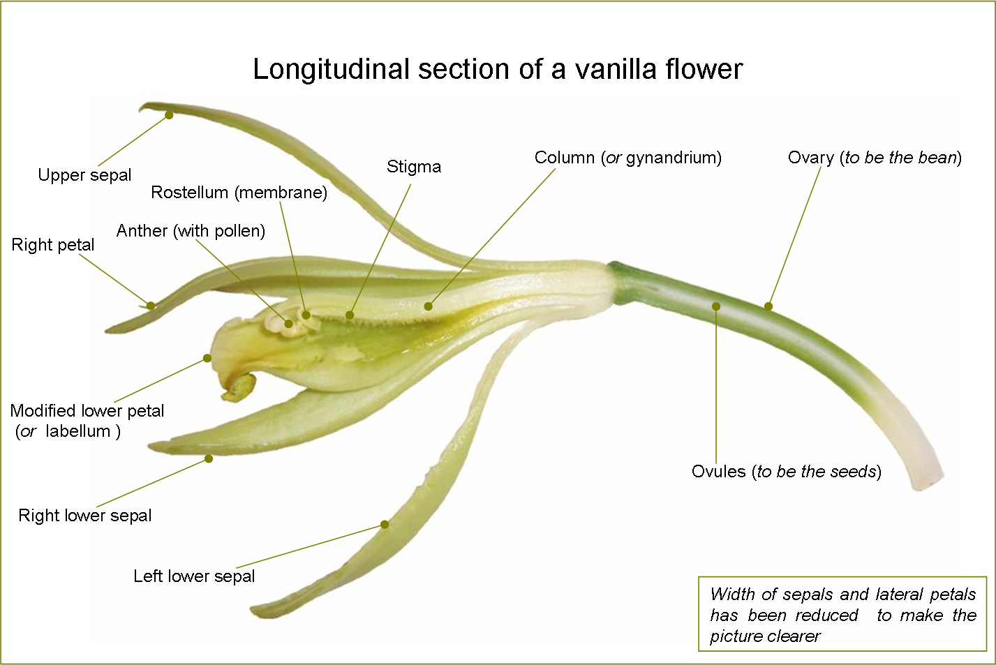 Photo & caption : B.navez - JAN 2006